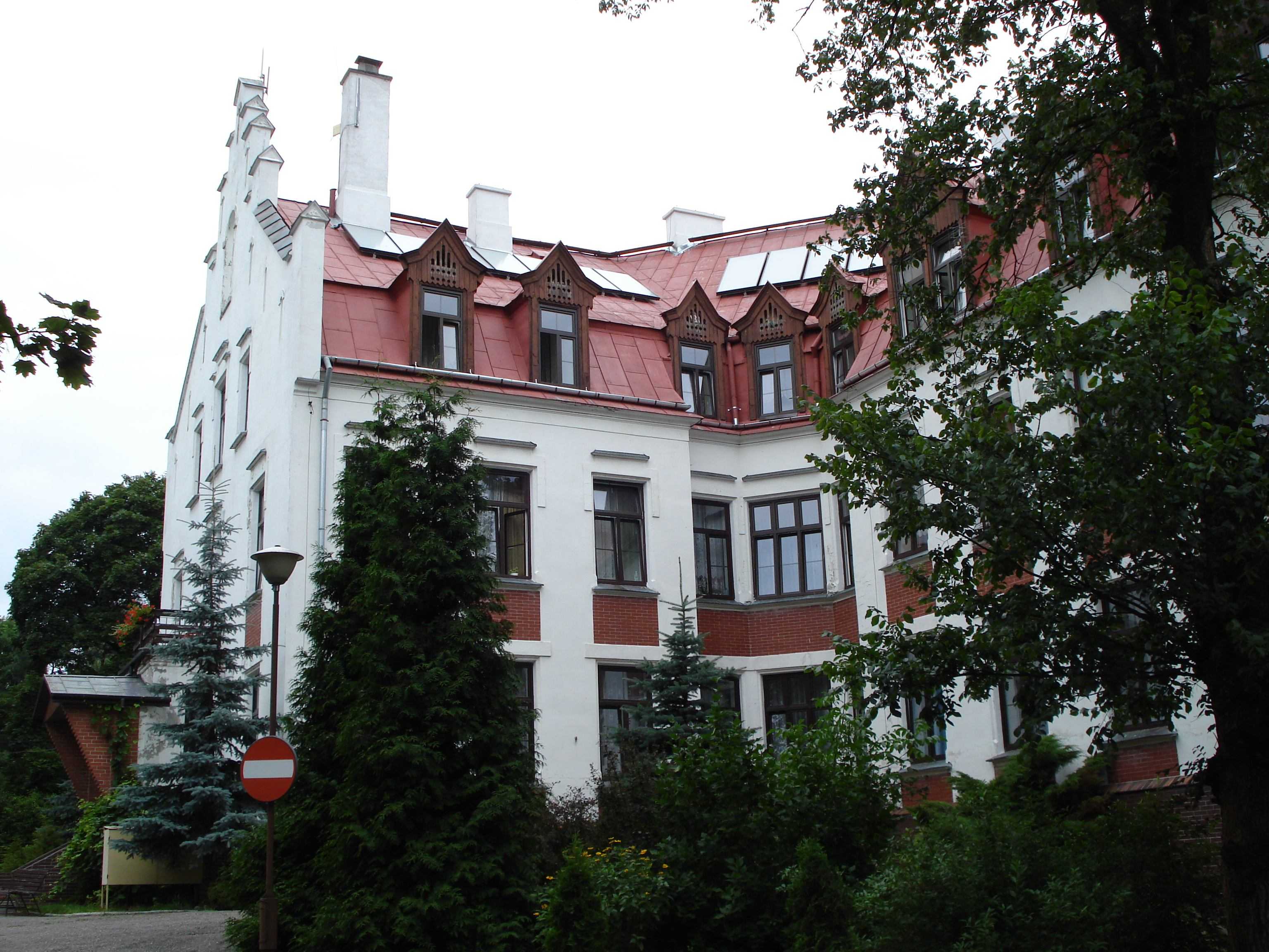 Dom pomocy społecznej w Zielonce